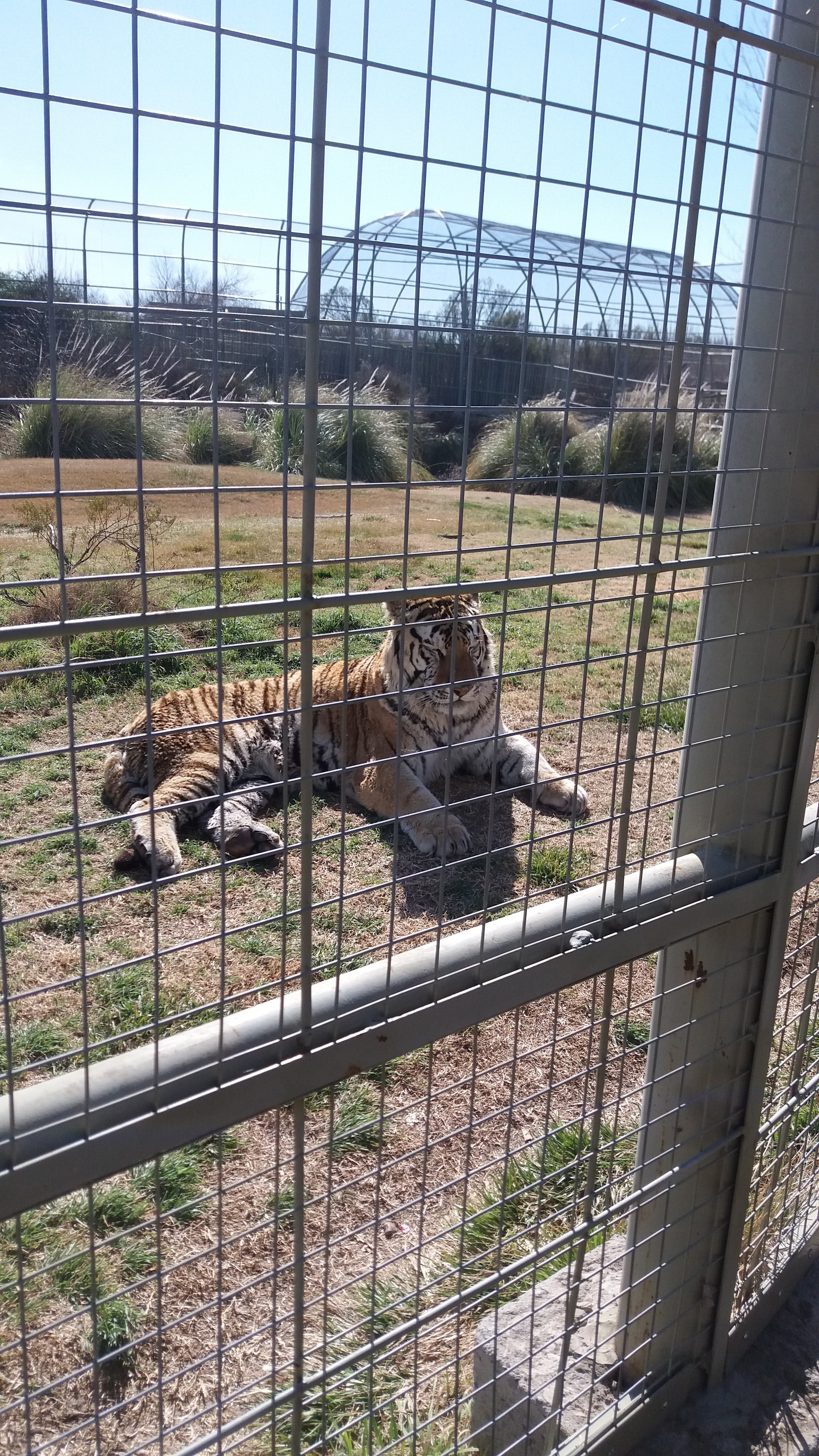 Tigre en zona de Sabana Africana